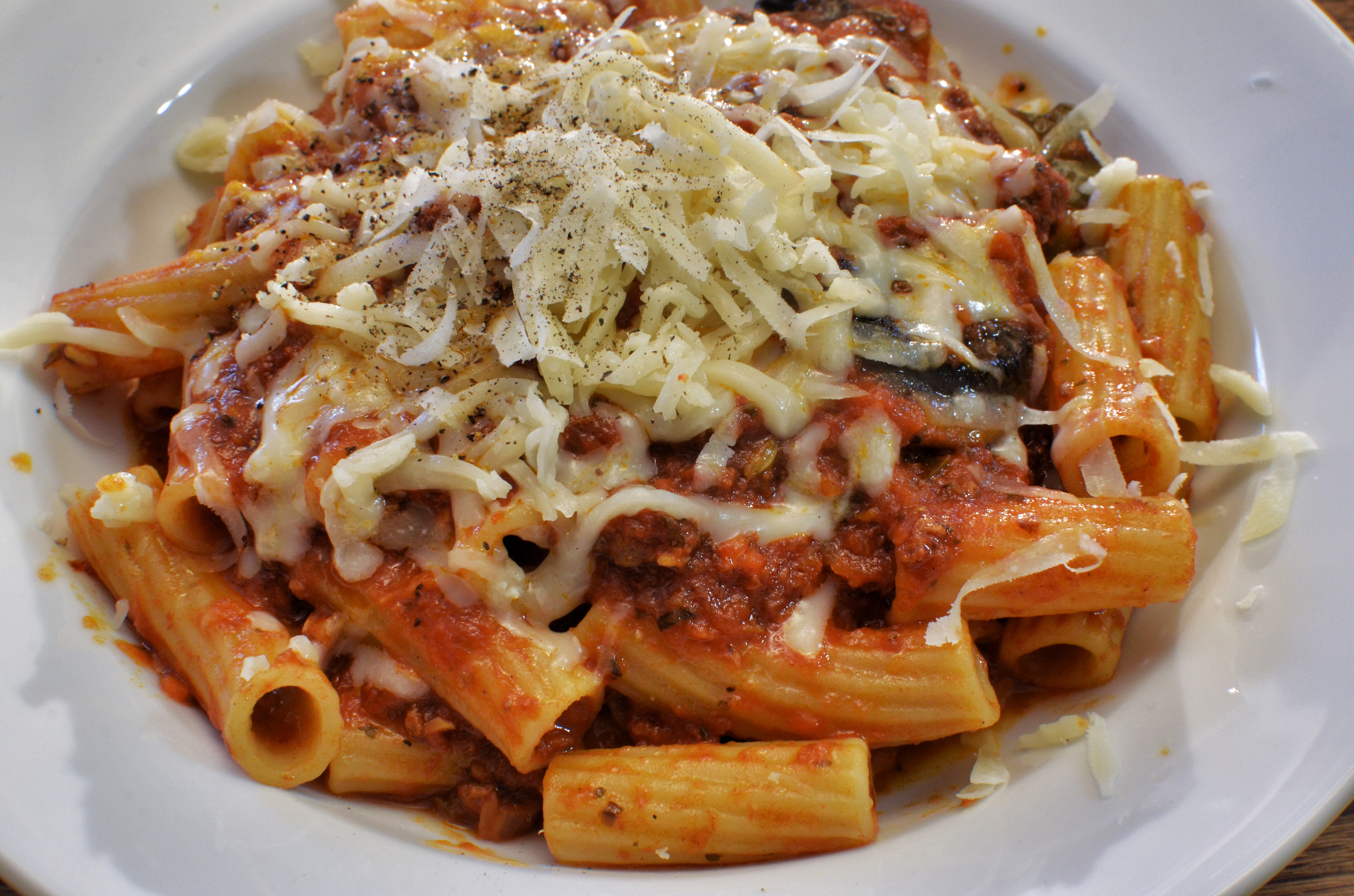 Mmm... elicoidali pasta